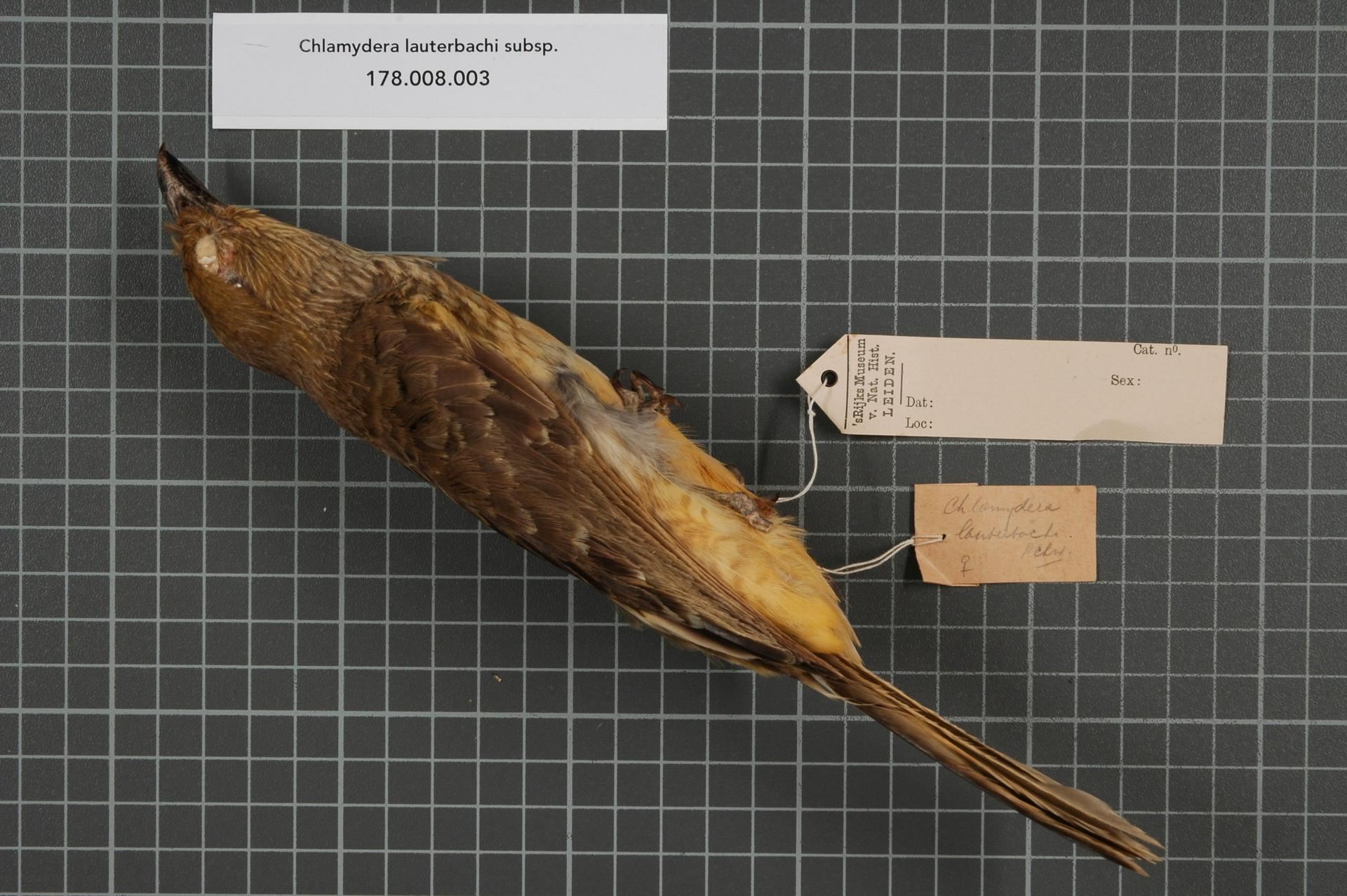 Chlamydera lauterbachi subsp.